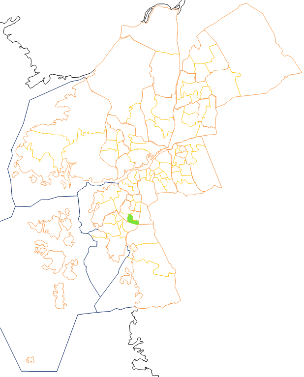 Karta som visar primärområdes belägenhet i Göteborg